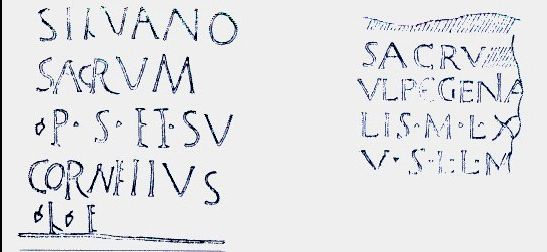 Zeichnung der Inschriften der Weihesteine von Ma.Gugging/NÖ von 1909 (nach R.Münsterberg) Quelle: Klosterneuburg, Geschichte und Kultur, Band 1